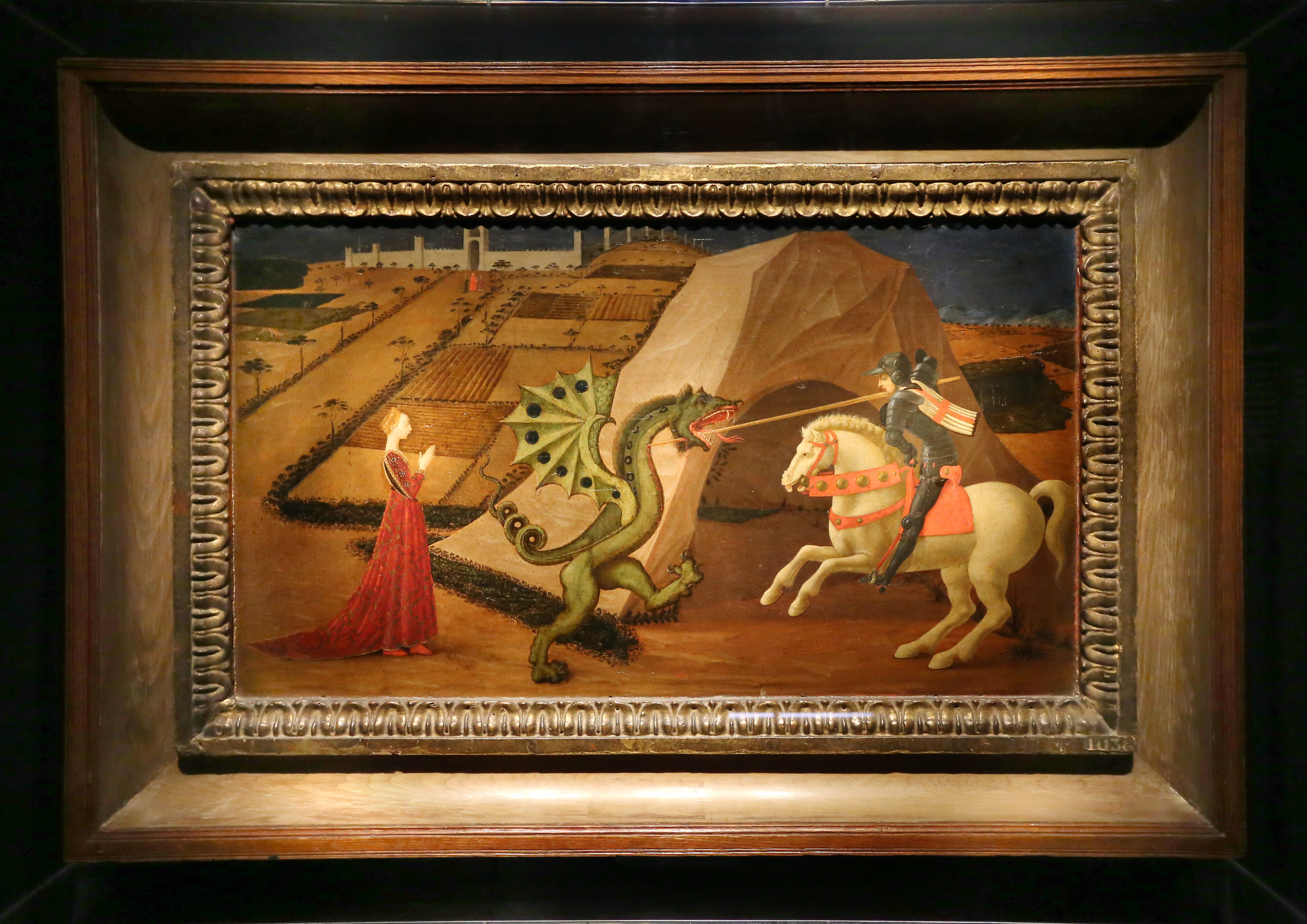 Palazzo dei Diamanti (Ferrara) This is a photo of a monument which is part of cultural heritage of Italy.